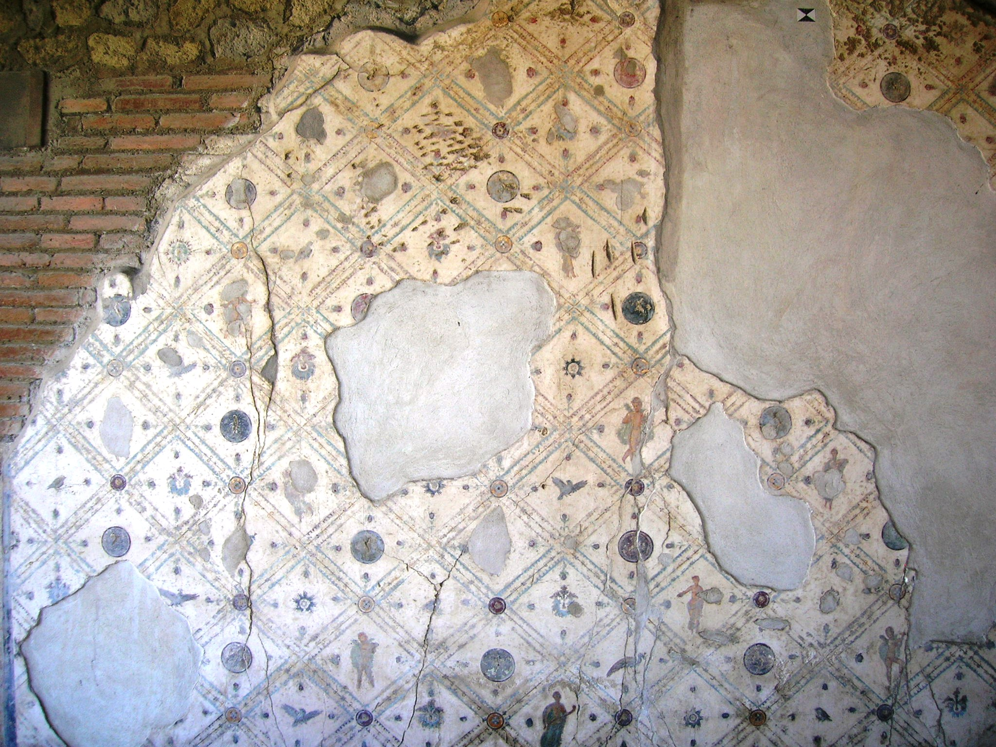 Villa Arianna, villa d'otium dell'antica Stabiae, l'odierna Castellammare di Stabia